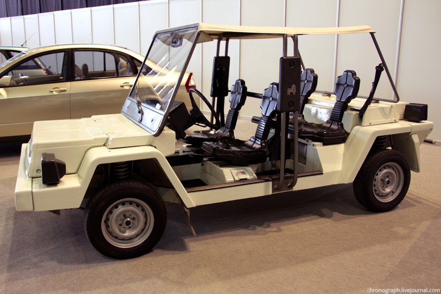 Опытный легковой автомобиль Автоваза с открытым кузовом. Модель ВАЗ 1801. Тольяттинский автосалон 2012